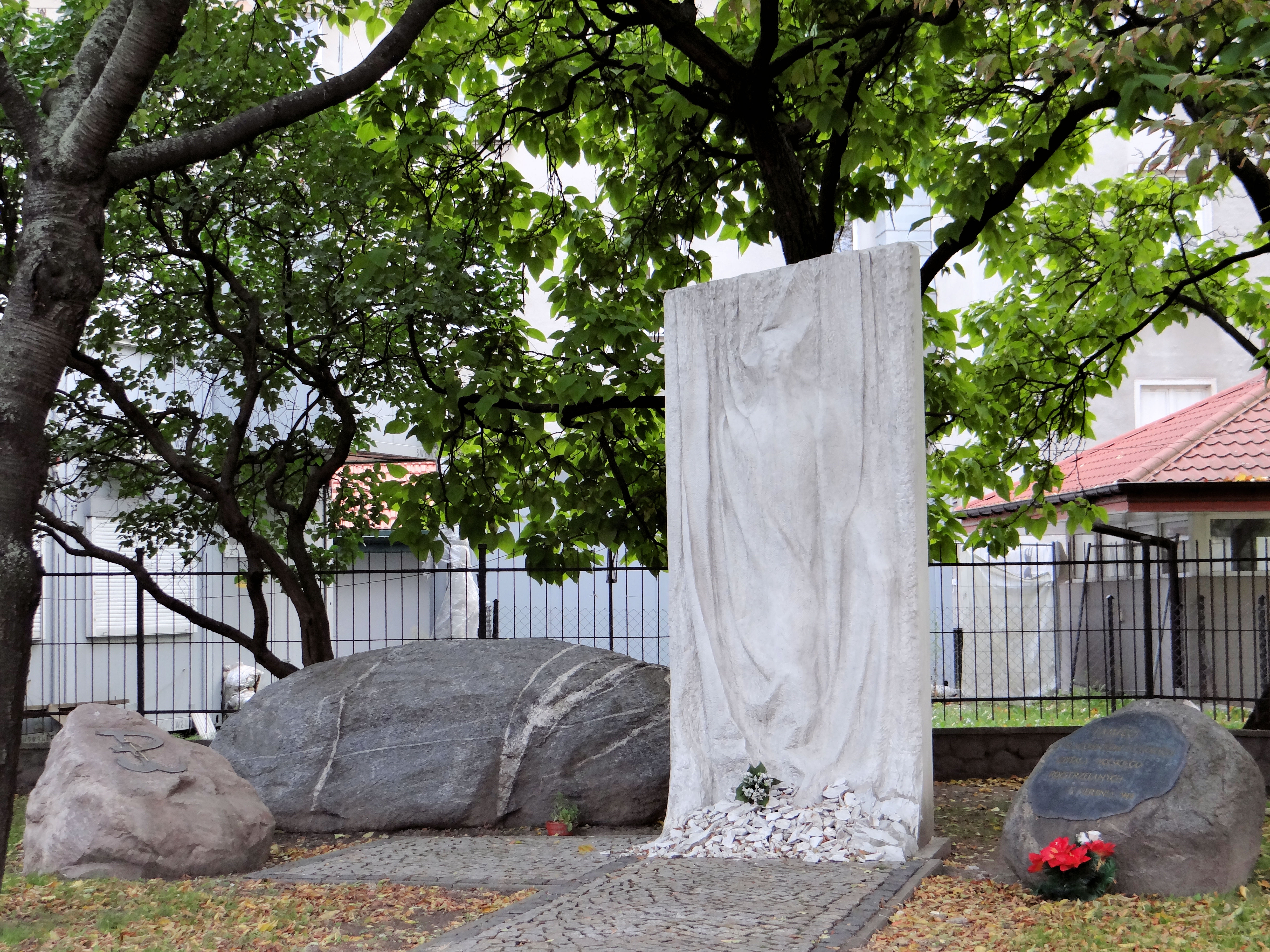 Pomnik ku czci pomordowanych pacjentów i personelu Szpitala Wolskiego w Warszawie w sierpniu 1944 r